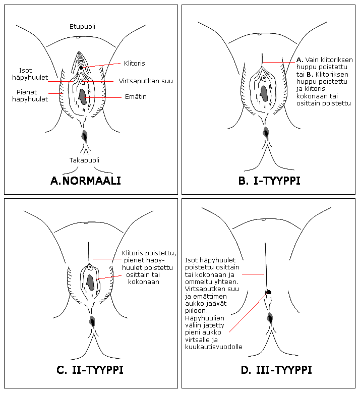 Image created by Kaylima. WHO:n luokitukset eriasteisille naisten sukuelinten silpoimstyypeille ("naisten ympärileikkaus").